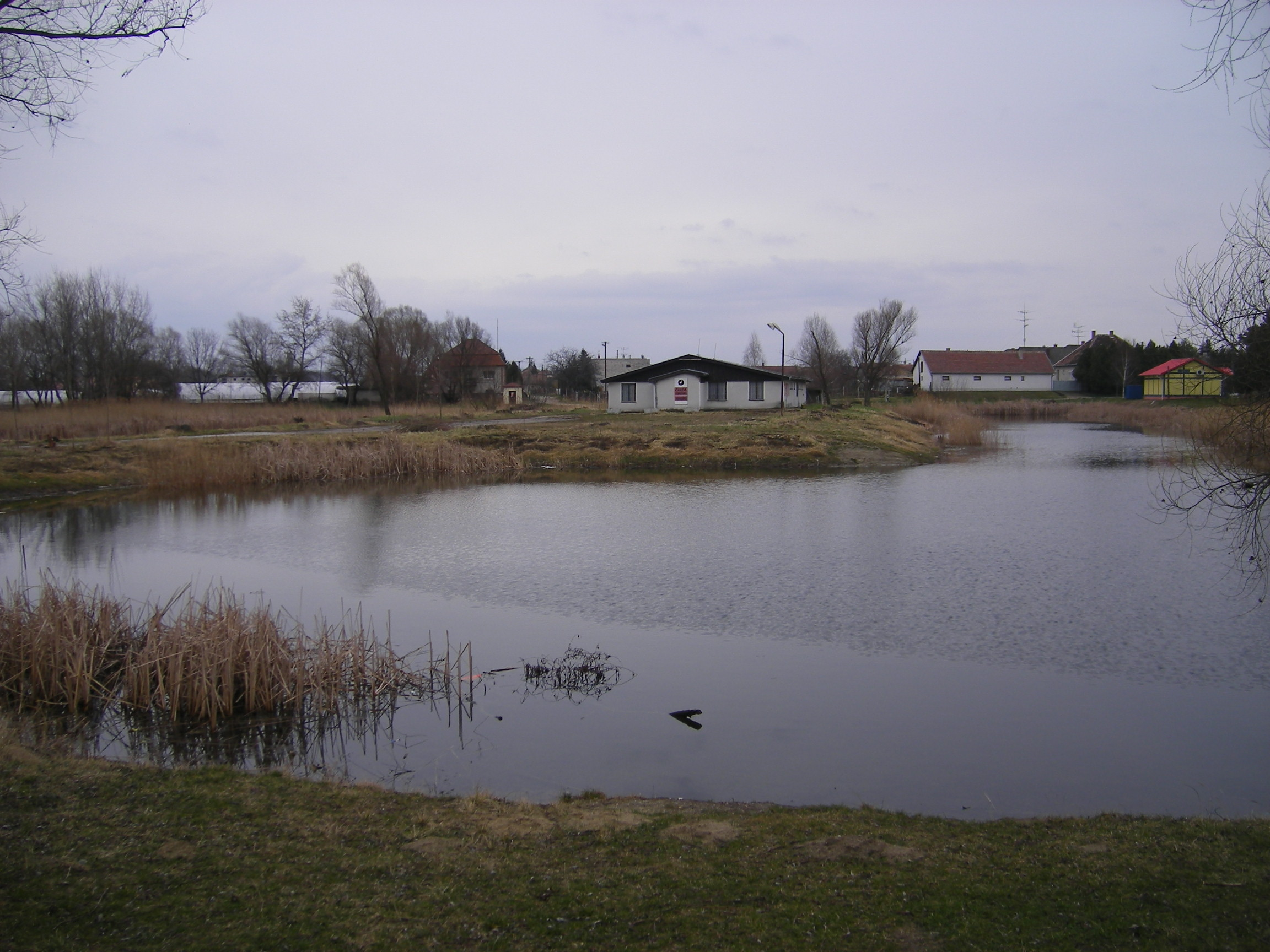 Hetény